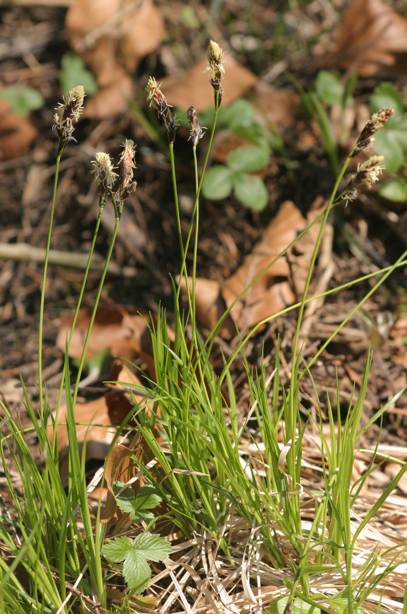 Carex montana (Berg-Segge) Aufnahmeort: bei Hollenstein an der Ybbs, Niederösterreich, Austria